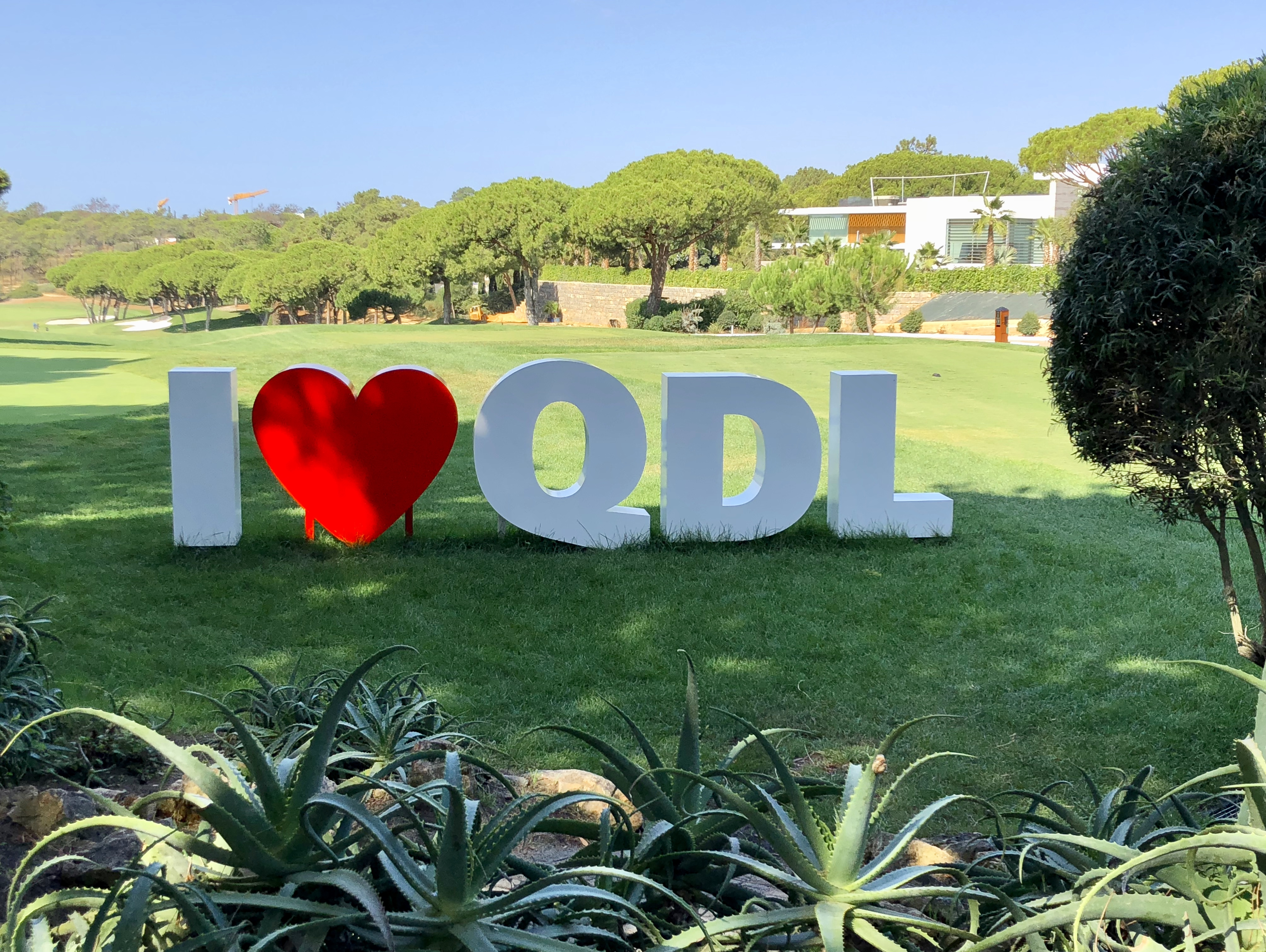 QDL - Quinto do Logo, Algarve, Portugal